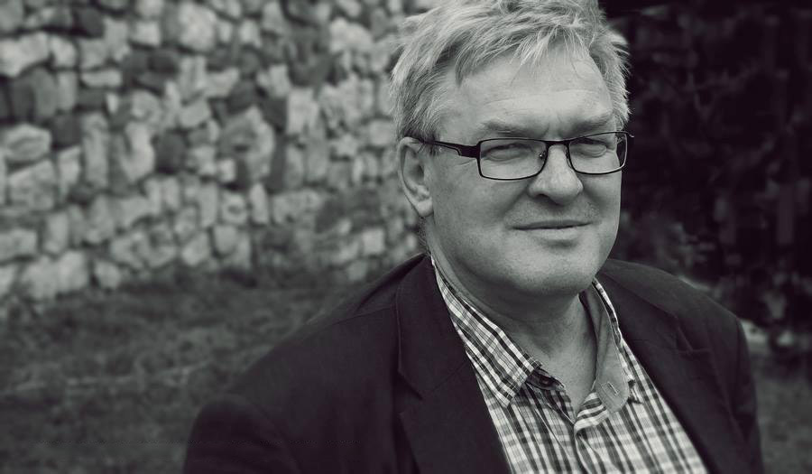 Závada Pál (Tótkomlós, 1954. december 14. –) József Attila- és Kossuth-díjas magyar író, szerkesztő, szociológus.